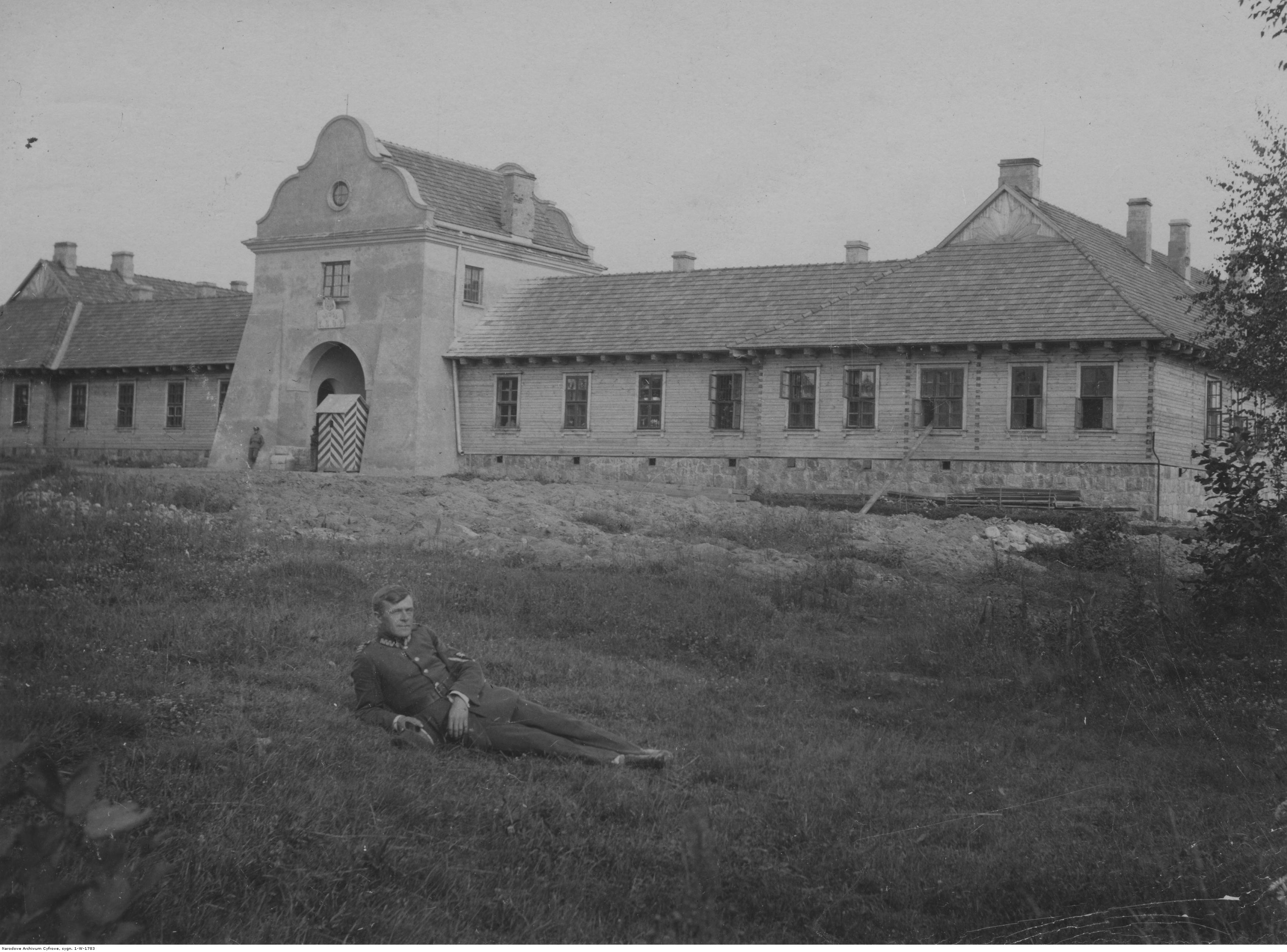 Koszary 7 Batalionu Korpusu Ochrony Pogranicza w powiecie duśnieńskim. Koncern Ilustrowany Kurier Codzienny - Archiwum Ilustracji. Sygnatura: 1-W-1783